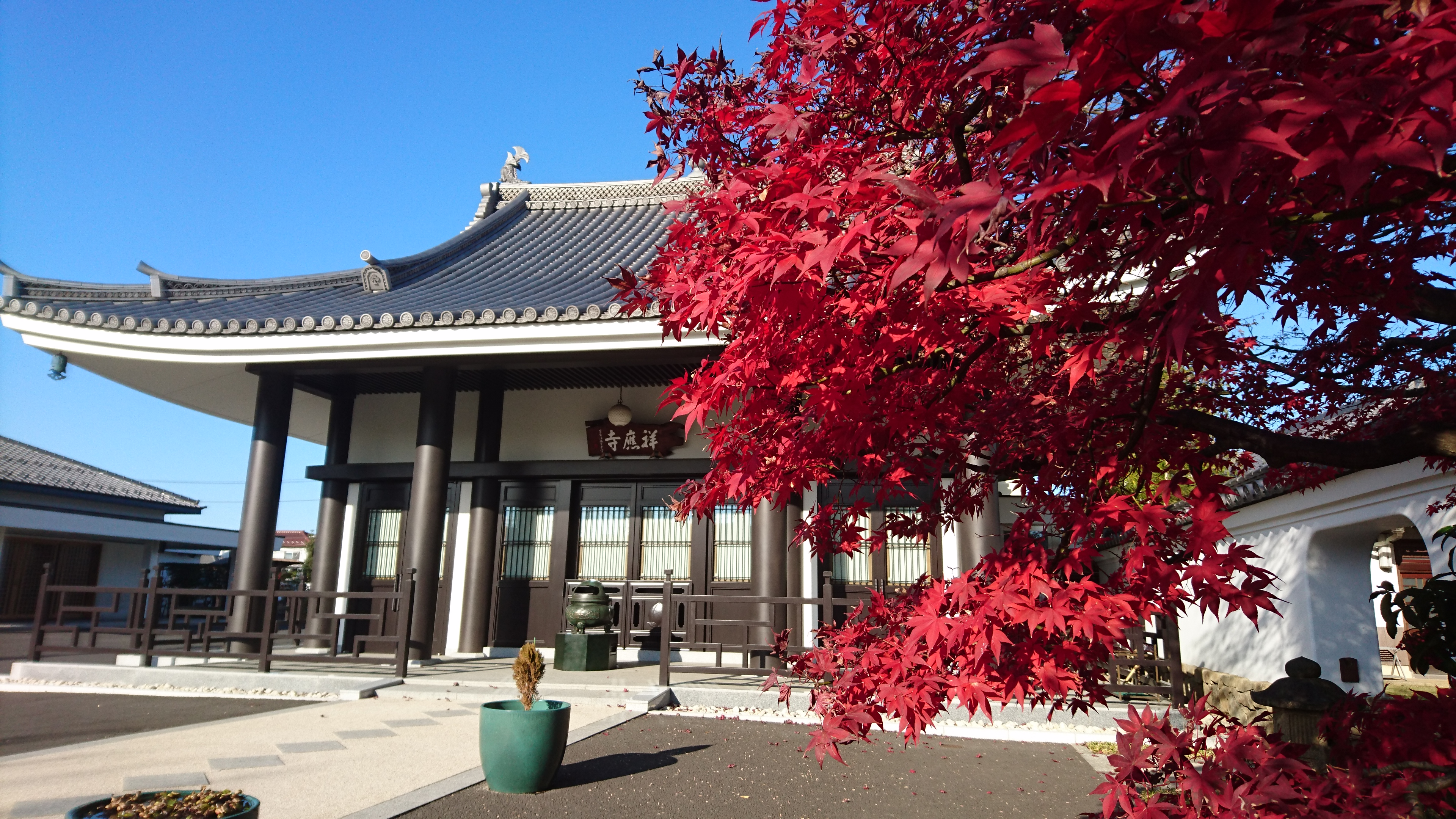 祥應寺本堂